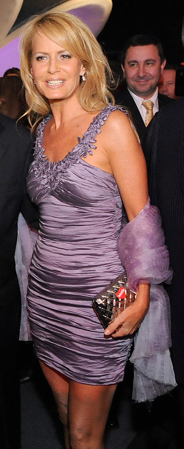 Cecilia Carolina Bolocco Fonck (Santiago de Chile, 19 de mayo de 1965). Es una ex presentadora de televisión chilena. Es célebre por haber sido elegida Miss Universo en 1987. Estuvo casada con el ex presidente argentino Carlos Menem, de quien se divorció en el año 2007.